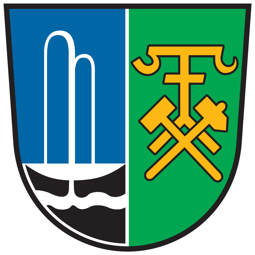 Wappen von Bas Bleiberg